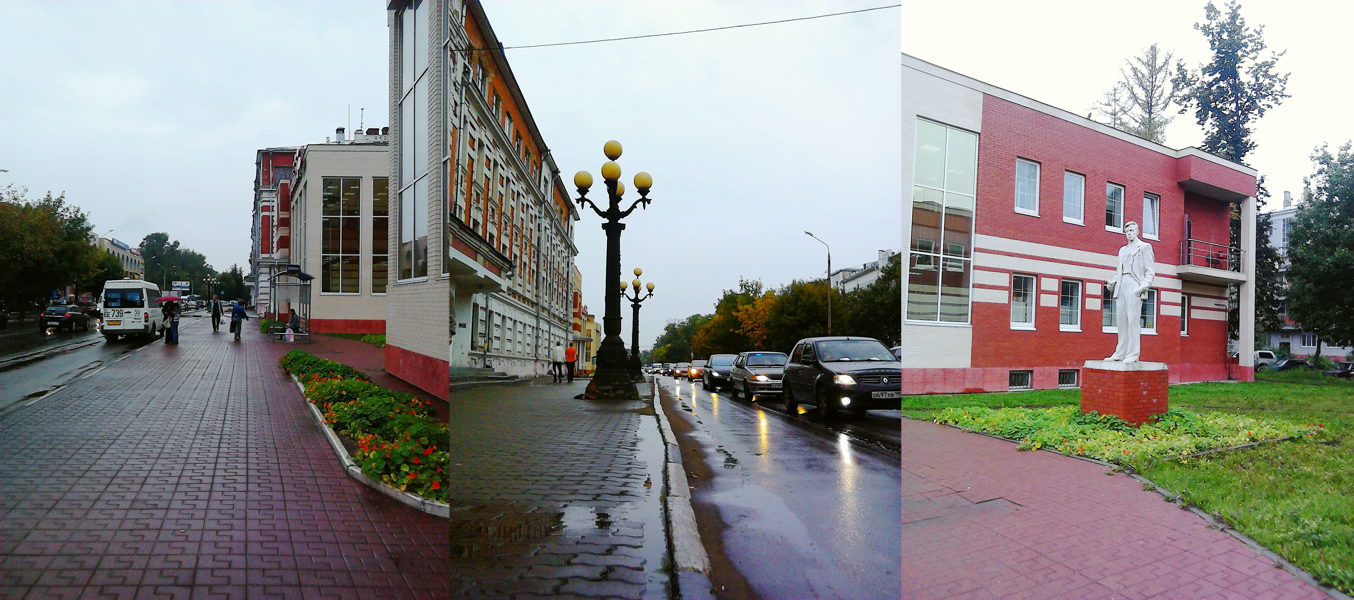 На улице Ленина (Орехово-Зуево), август 2013